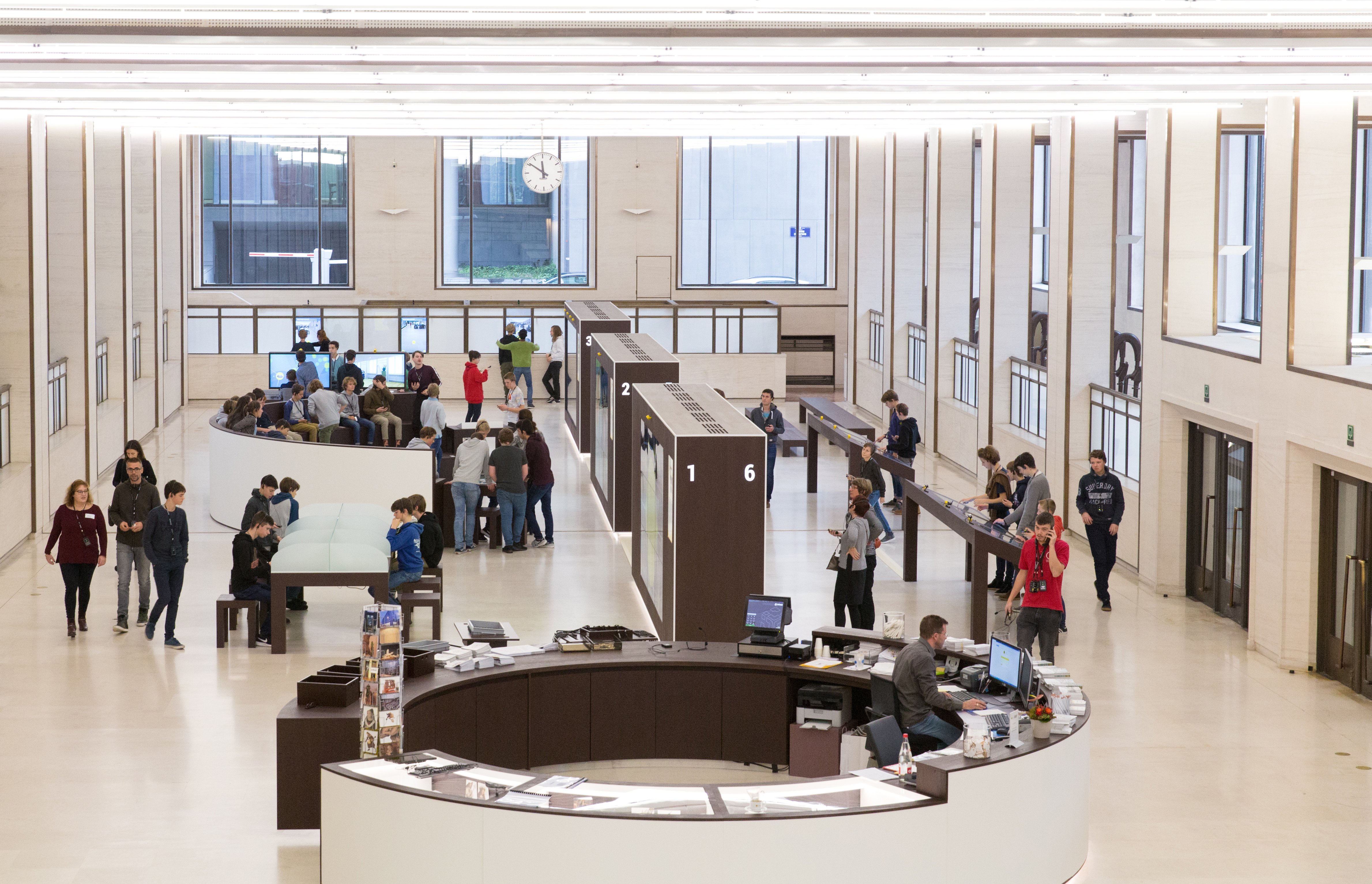 Overzichtsfoto van het Bezoekerscentrum